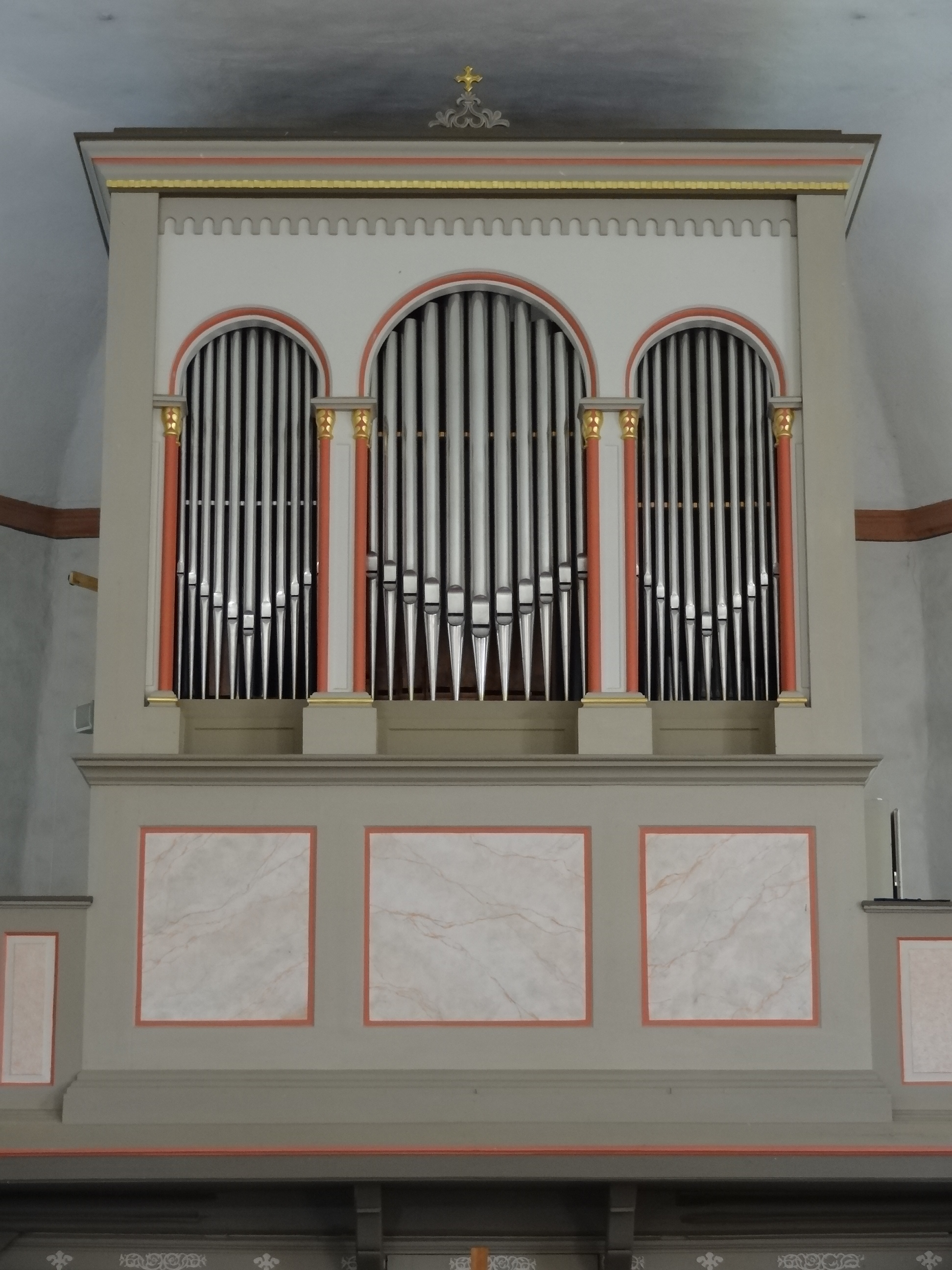 Kirche Wirberg